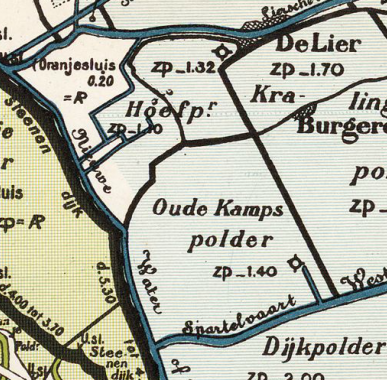 Oude_Kamps_polder